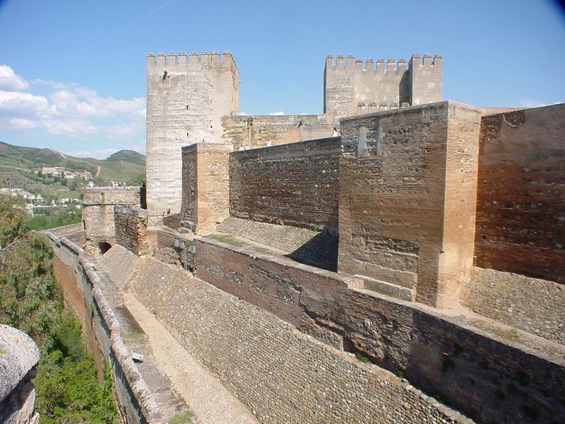 Granada Alhambra eigenes Foto 2004 public domain Mewes 08:04, 5. Mär 2005 (CET) dreifacher Mauerring der Alcazaba